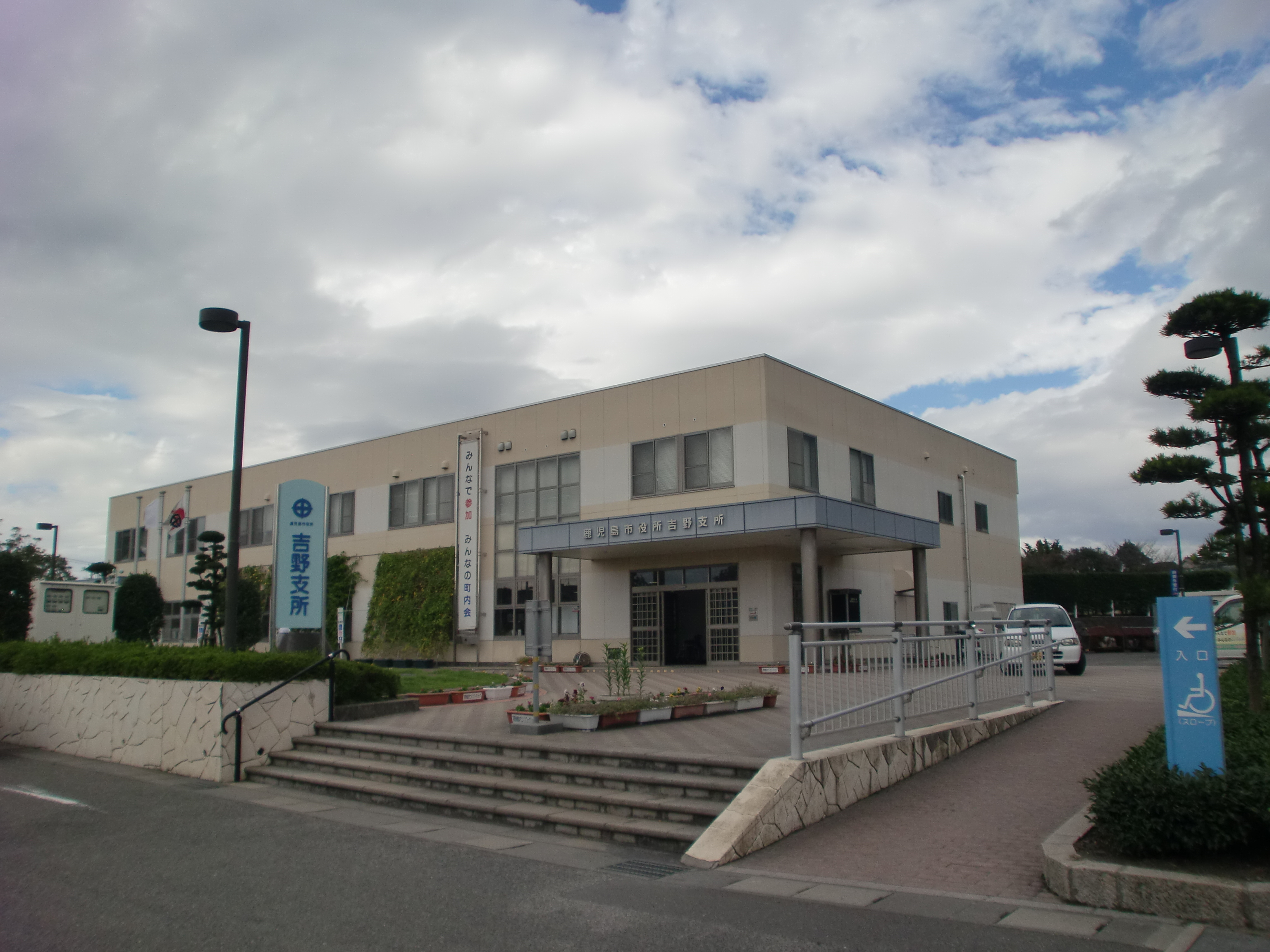 鹿児島市役所吉野支所の外観。